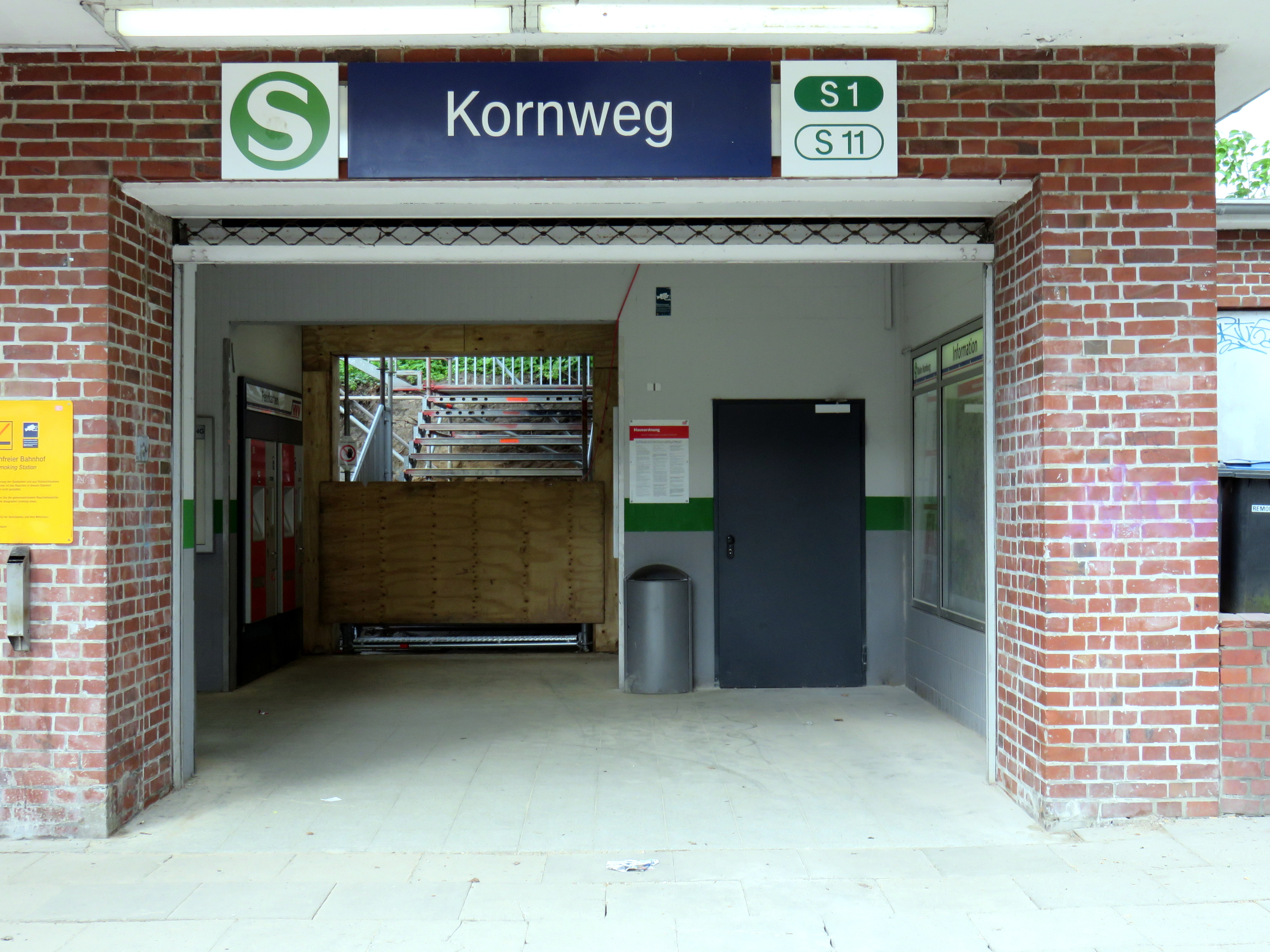 Bauarbeiten für den barrierefreien Zugang (Fahrstuhl) am S-Bahnhof Kornweg im Ortsteil Klein Borstel, Hamburger Bezirk Nord, verwaltungsmäßig Stadtteil Ohlsdorf. Zustand Mai 2017. Die ehemalige Info-Nische, jetzt mit Baustellenaufgang.